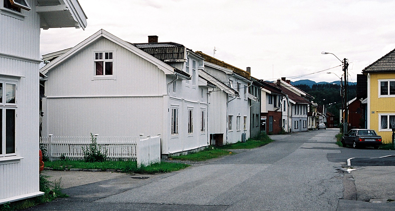 Storgata, Hokksund, Øvre Eiker, Norway.